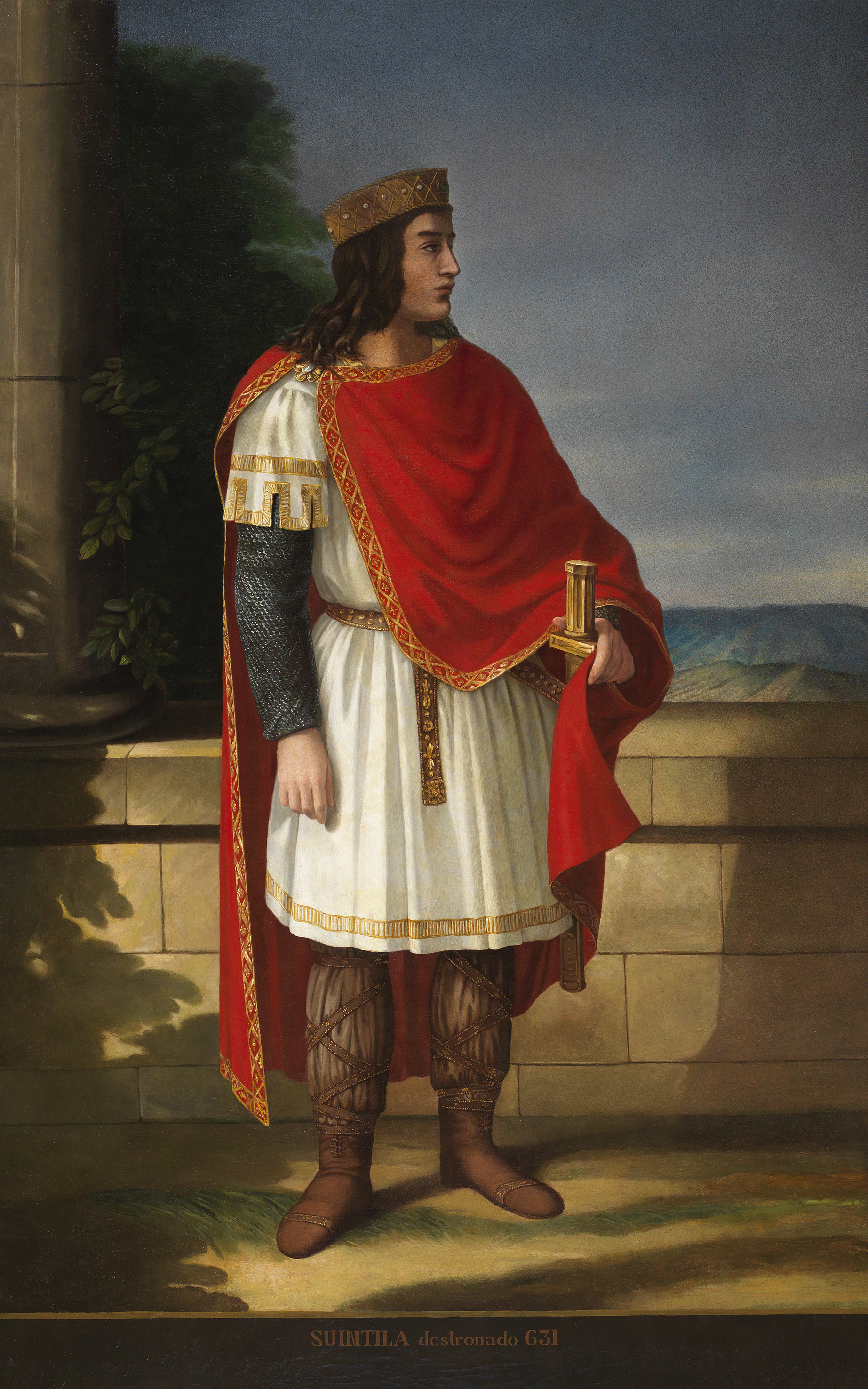 El lienzo representa a Witiza, rey de los visigodos